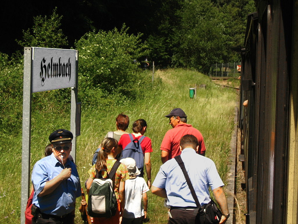 Haltepunkt Helmbach, selbst fotografiert